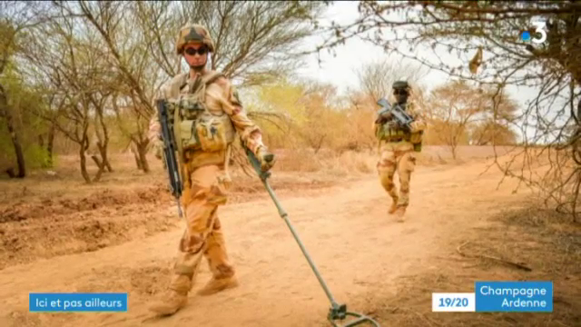 VAB du 3e régiment du génie dans la région de Gao, janvier 2017